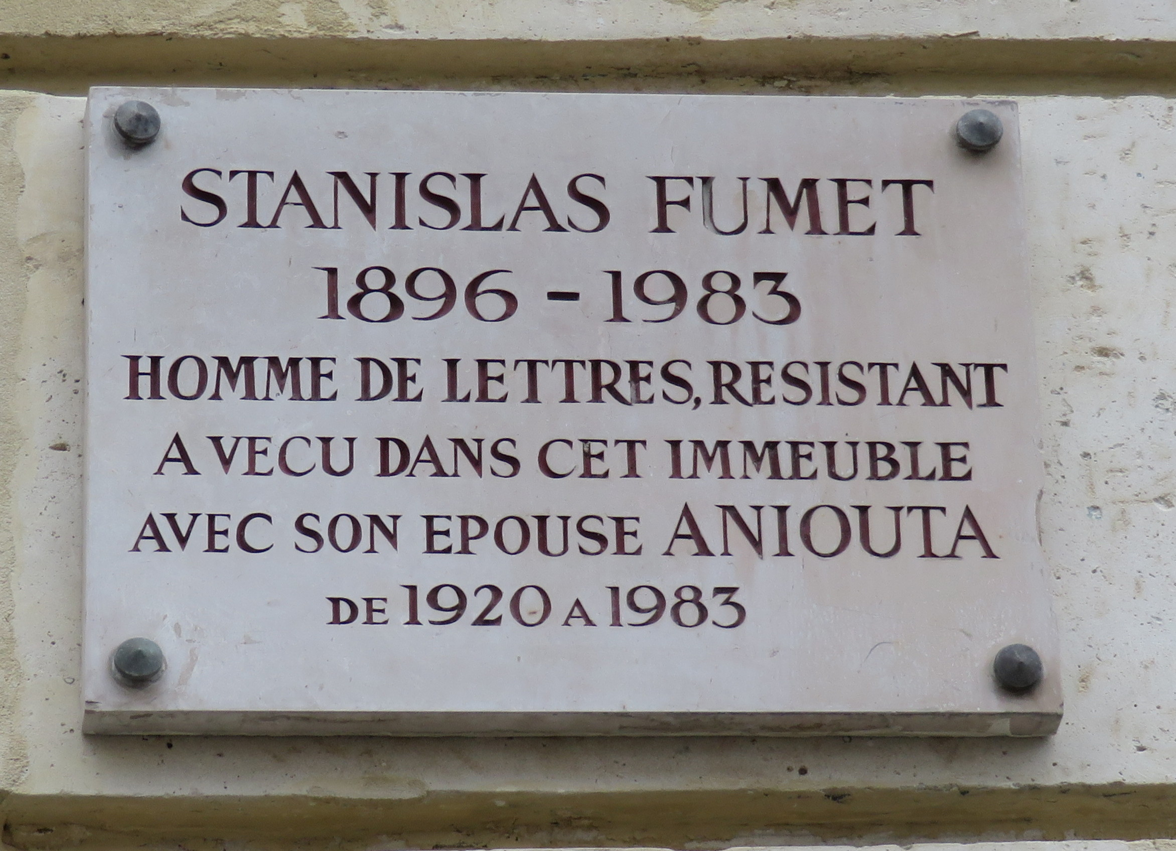 Plaque commémorative, 15 rue Linné, Paris « Stanislas Fumet 1896 - 1983 Homme de lettres, résistant A vécu dans cet immeuble Avec son épouse Aniouta De 1920 à 1983 »